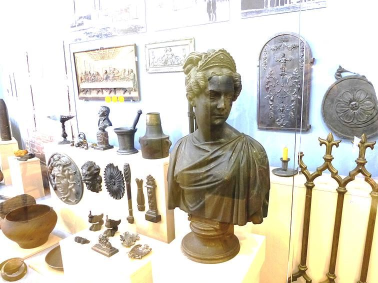 Образцы продукции Александровского завода XVII-XIX в.в..(источник - Национальный музей Республики Карелия)